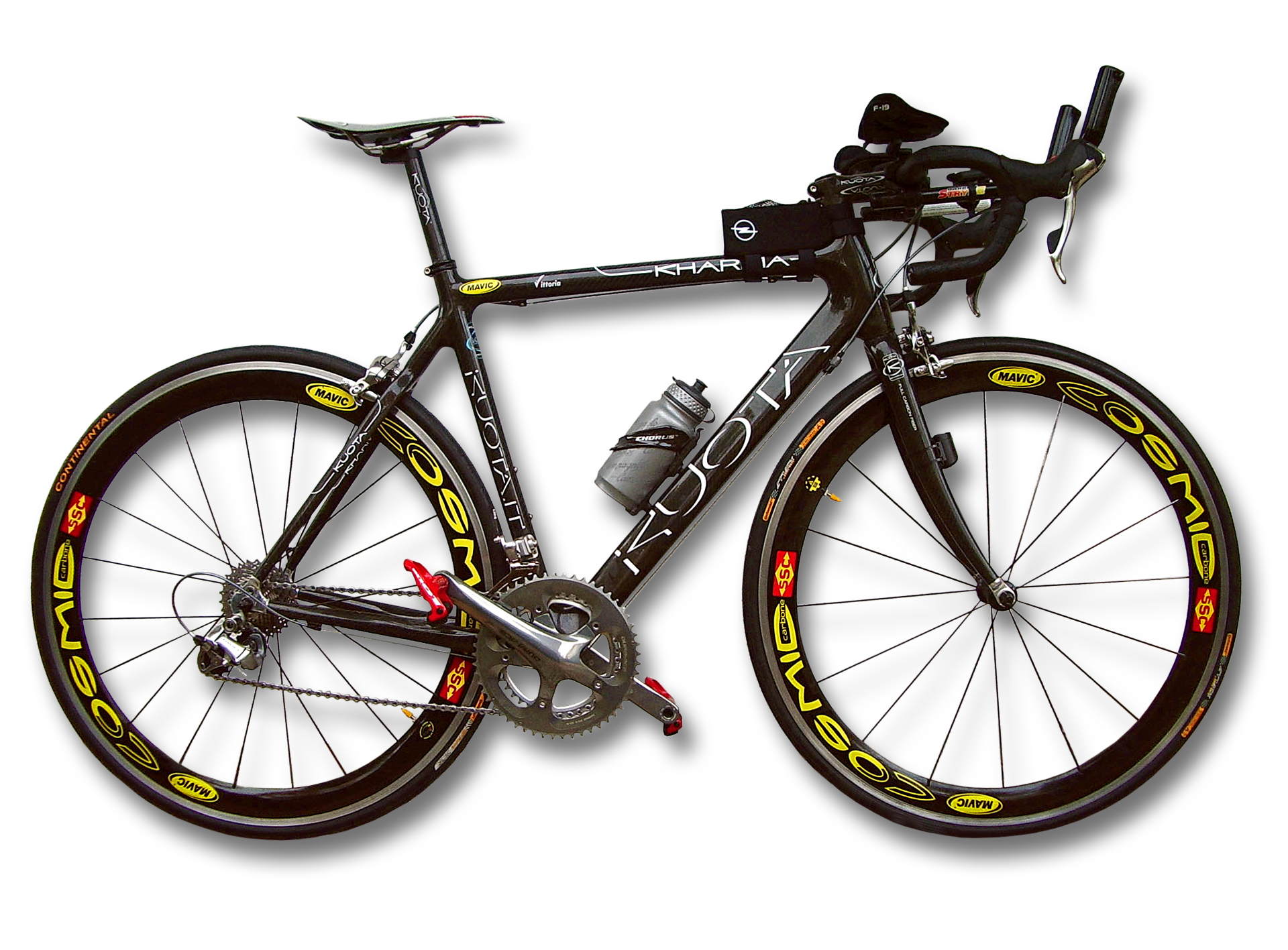 Modernes Rennrad, Verwendung des Materials Carbon zur Gewichtsoptimierung.